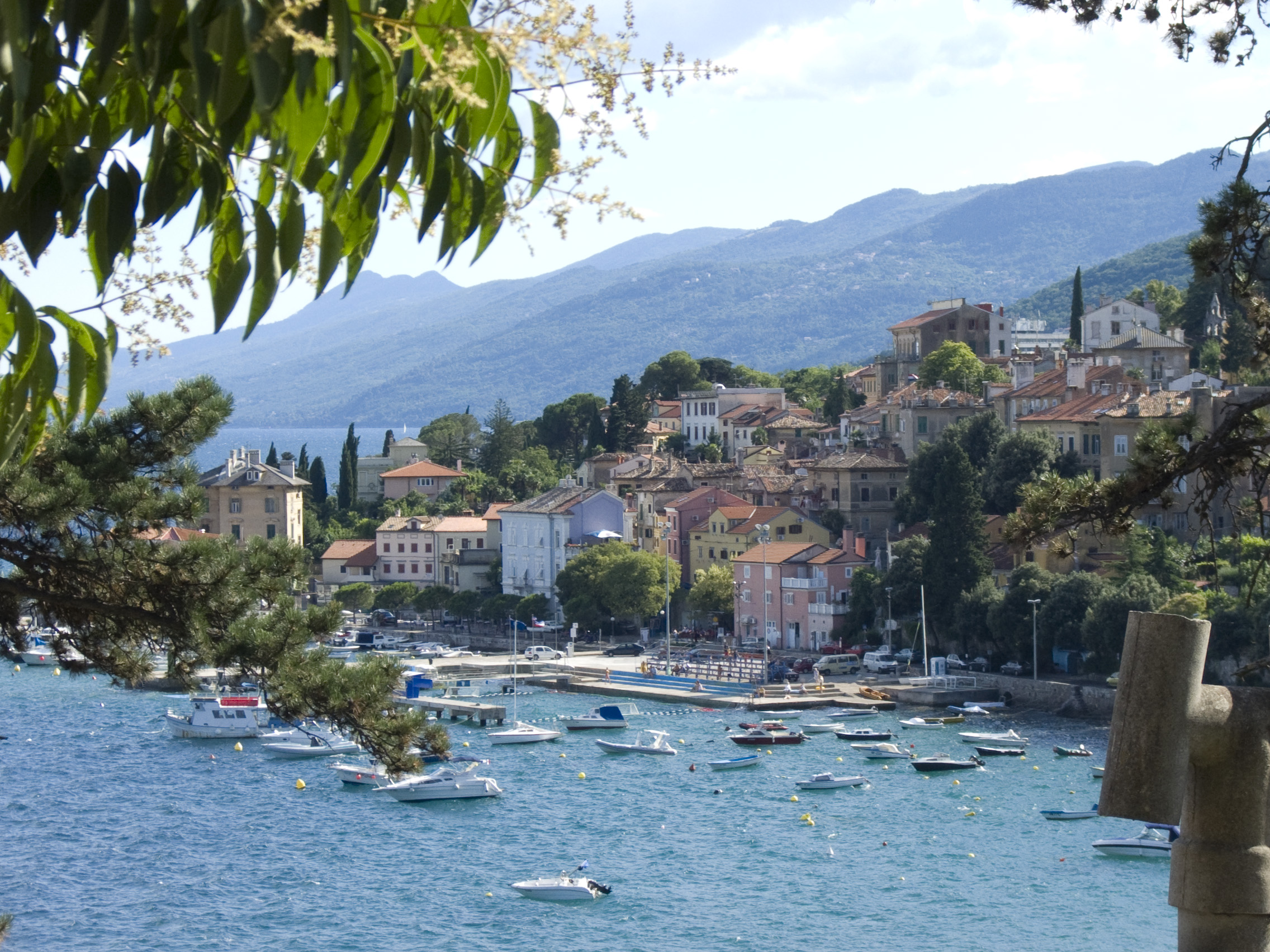 Aussicht auf Volosko